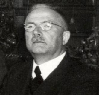 Jan van den Tempel (1877-1955), Nederlands politicus